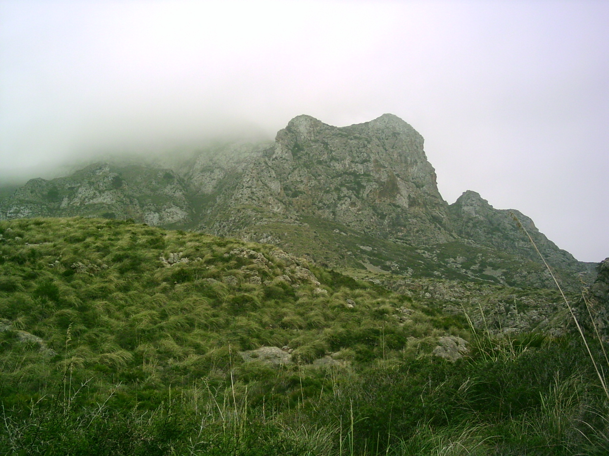 Beschreibung: mountains by Artà, Mallorca, Spain Quelle: Fotografiert im März 2006 Fotograf: Alma